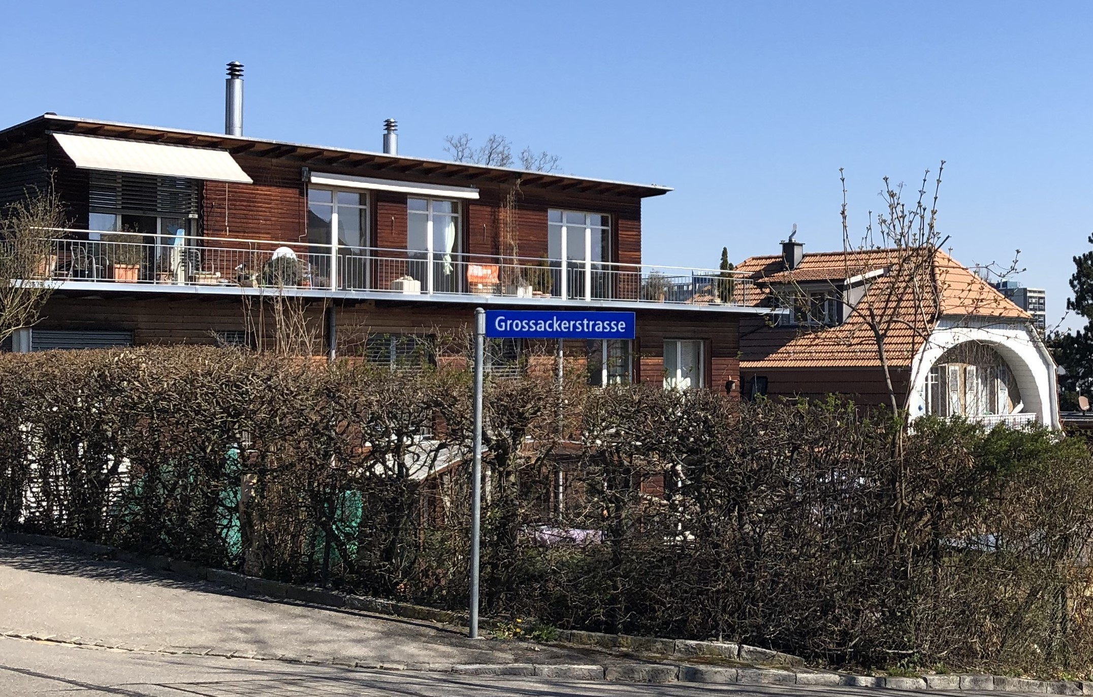 Winterhale Bebaung Siedlung